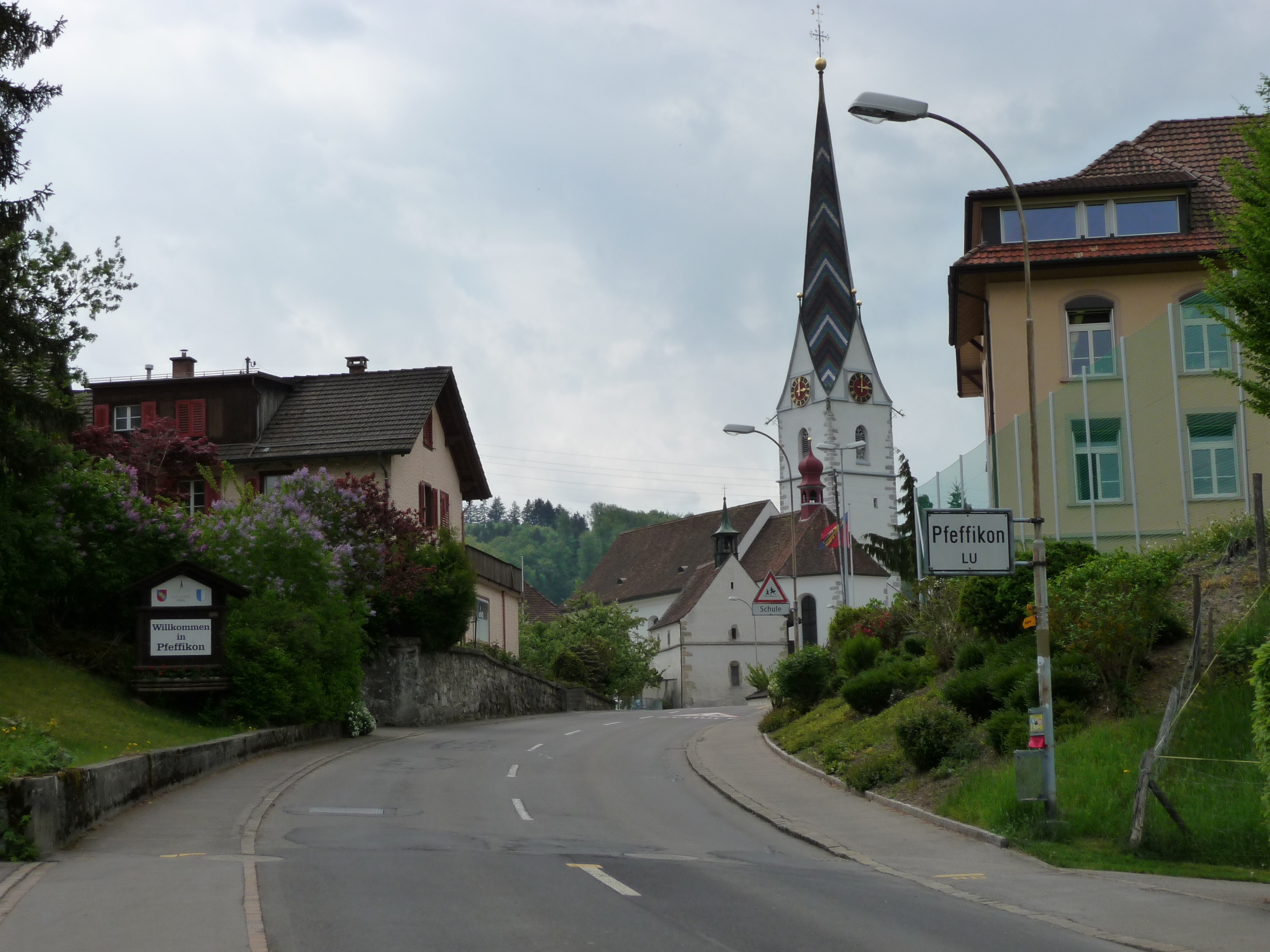 Dorfeingang von Pfeffikon